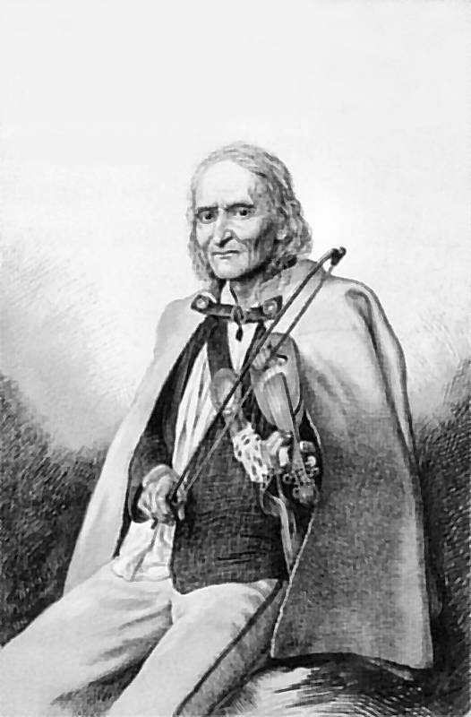 Jan Krzeptowski - Sabała, Muzeum Tatrzańskie, Zakopane